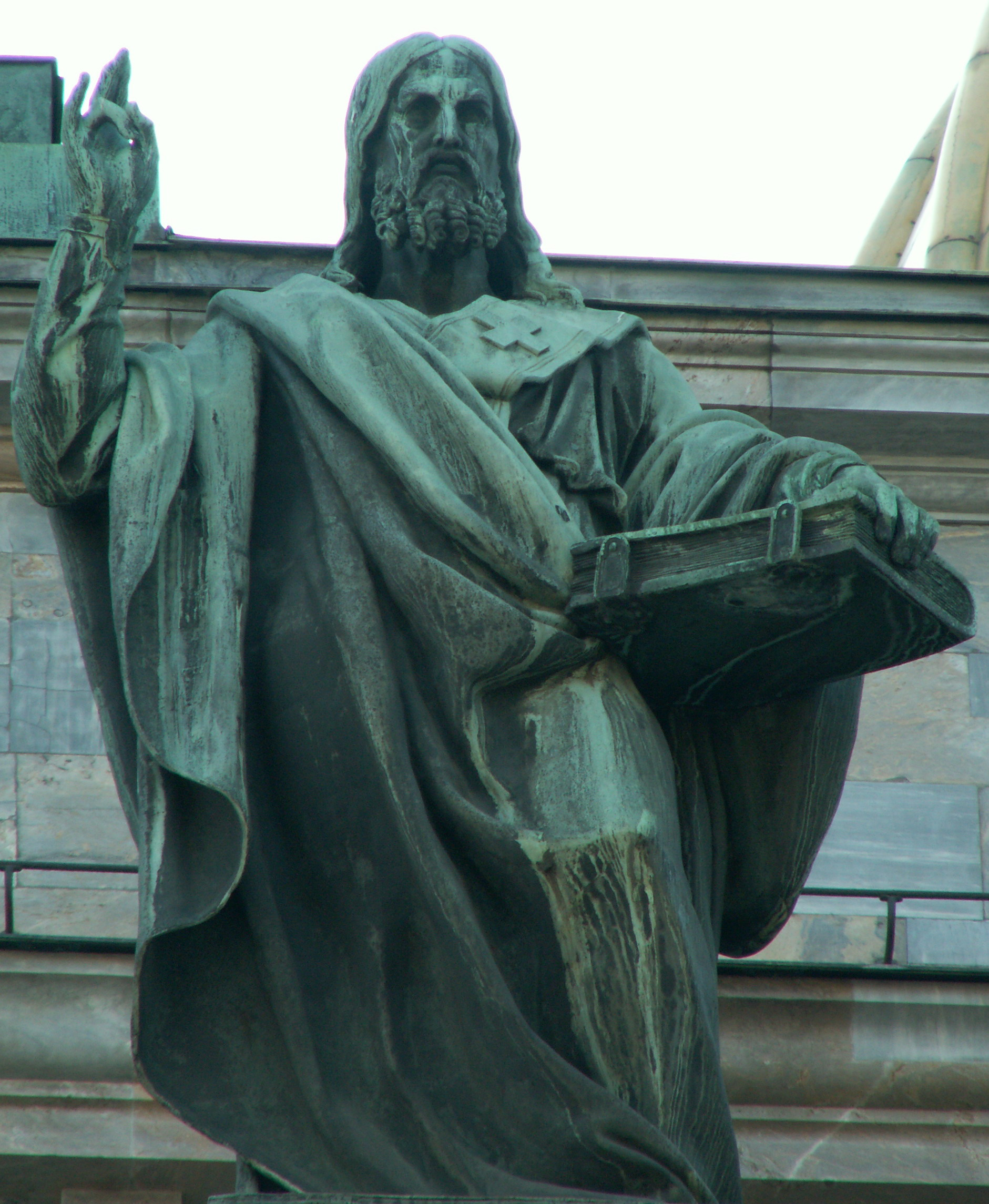 Statue of Apostle Jacob on Saint Isaac's cathedral. Saint Petersburg, Russia Статуя Апостола Иаков на Исаакиевском соборе. Санкт-Петербург. Россия.